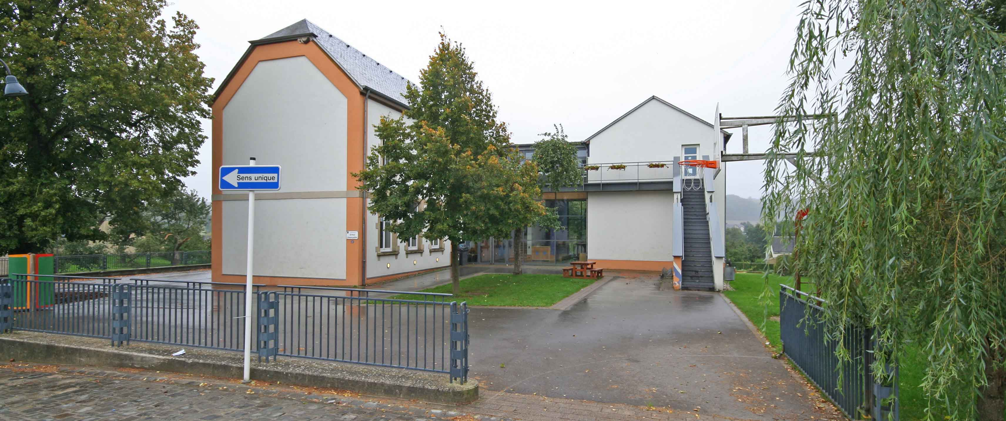 *Sujet:Uewerpallen Schoul Source:Fotograf Cornischong